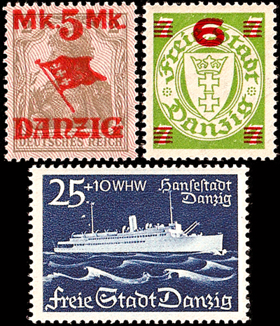 Stamps of the Free City of Gdańsk/Danzig 1920-1939/Znaczki W. M. Gdańska 1920-1939